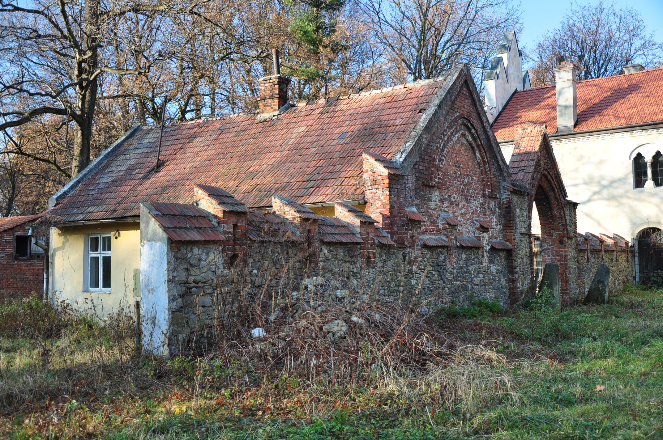 Zawada - zespół dworski (zabytek nr A-253 z 18.03.1972)